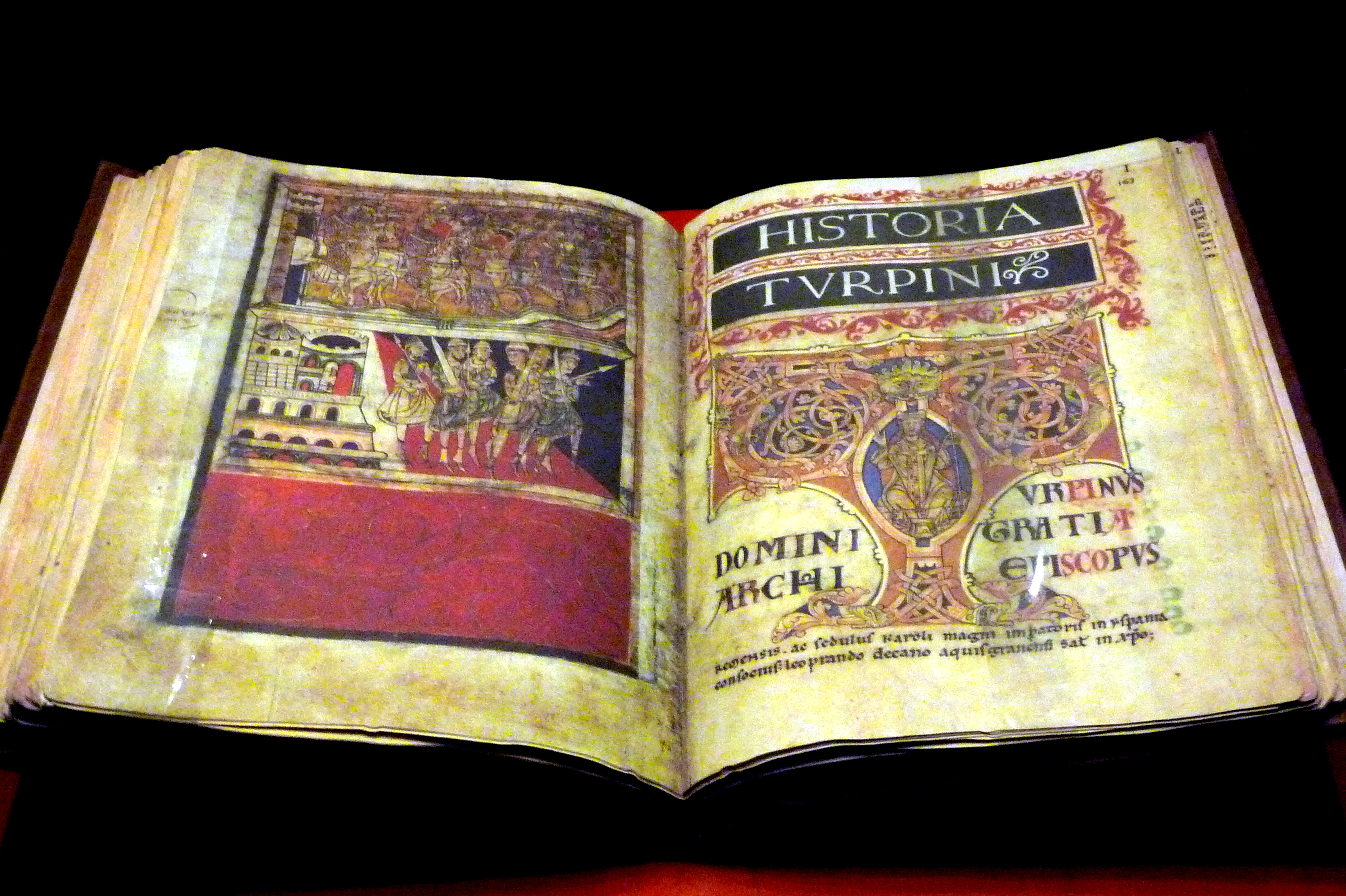 El Códice Calixtino es un manuscrito iluminado del siglo XII conservado en el Archivo de la catedral de Santiago de Compostela.